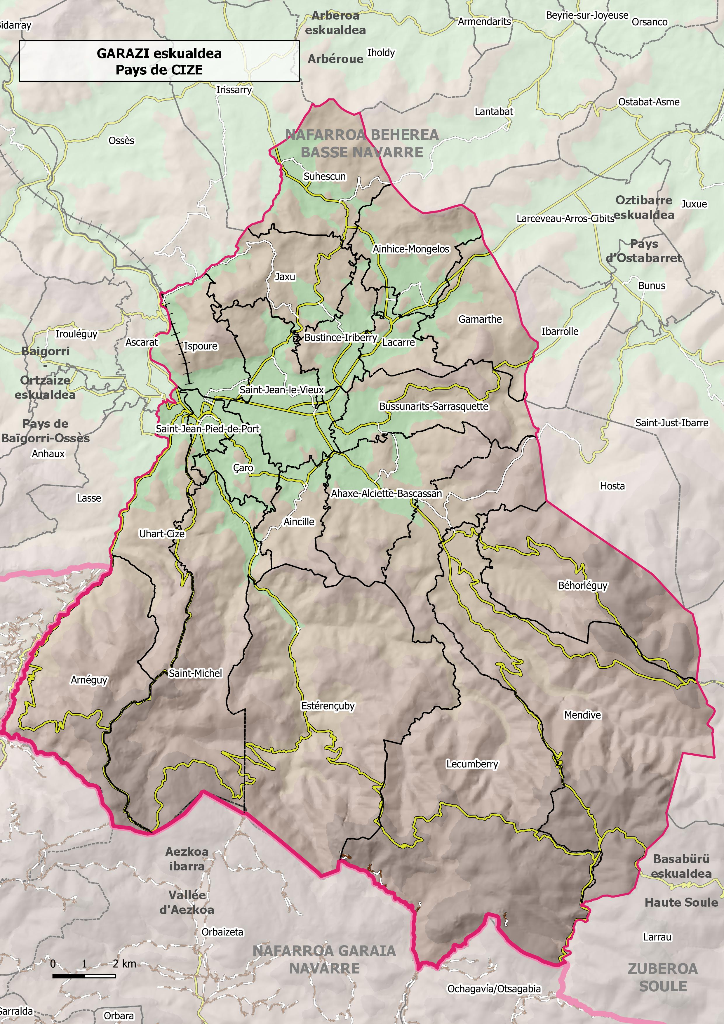 Modèle numérique de terrain : EU-DEM v1.1 (Copernicus Land Monitoring Service, AEE). Route 500 (IGN), Redes de transporte de Navarra (CNIG)